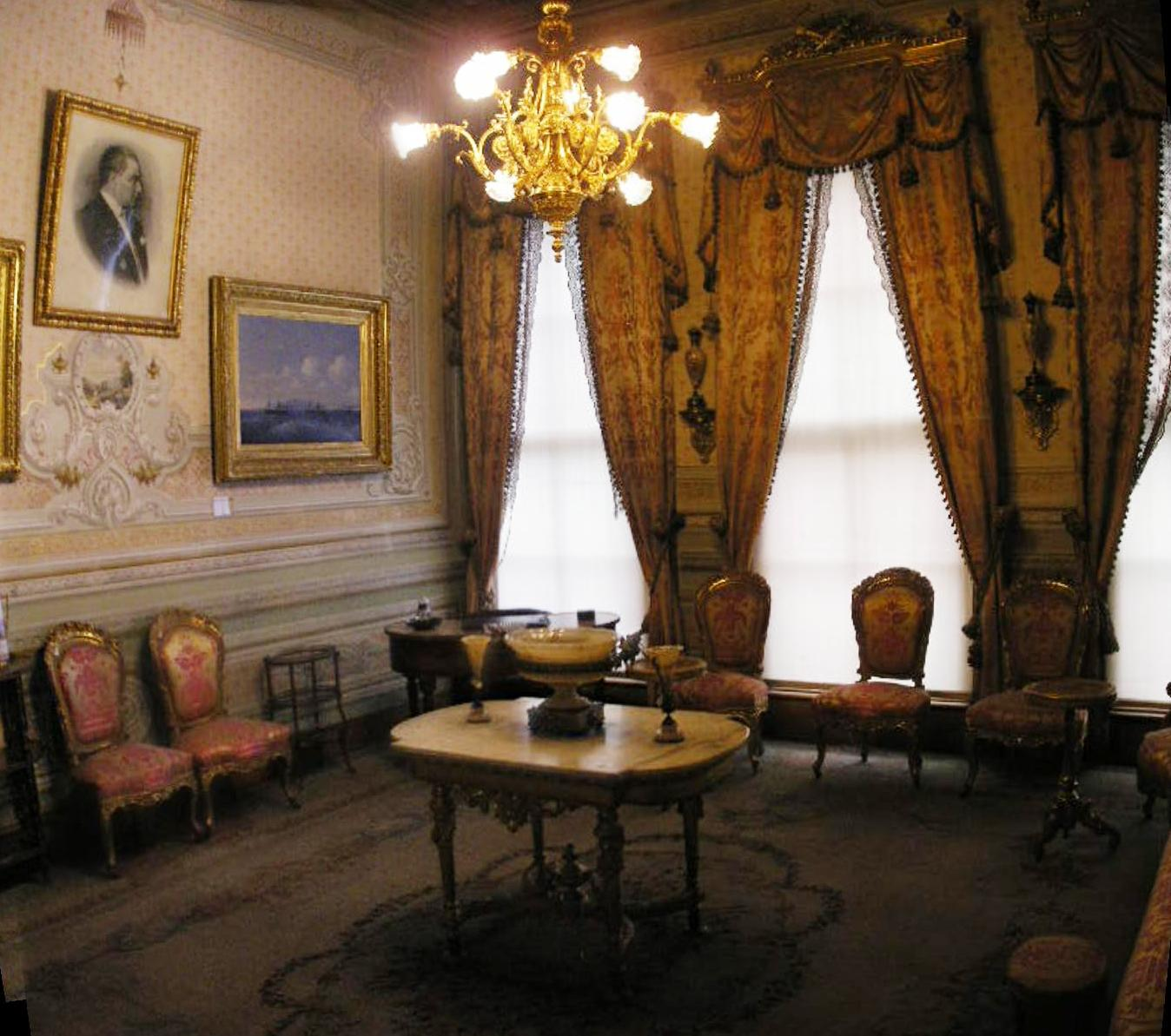 Atatürk's study (Atatürk'ün Çalişma Odası) in Dolmabahçe Palace (#12 of the tour).